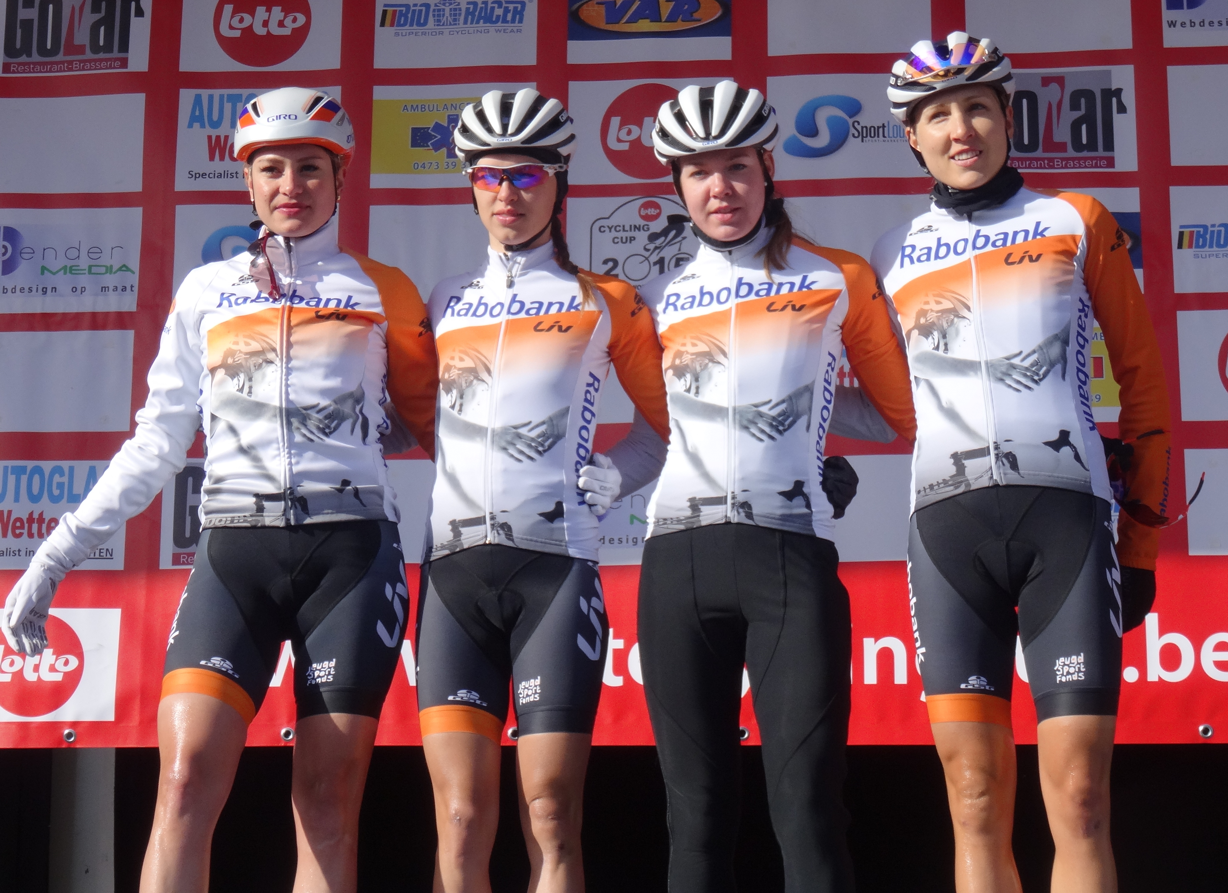 Reportage réalisé le mercredi 4 mars à l'occasion du départ du Samyn des Dames 2015 et du Samyn 2015 à Quaregnon, Belgique.